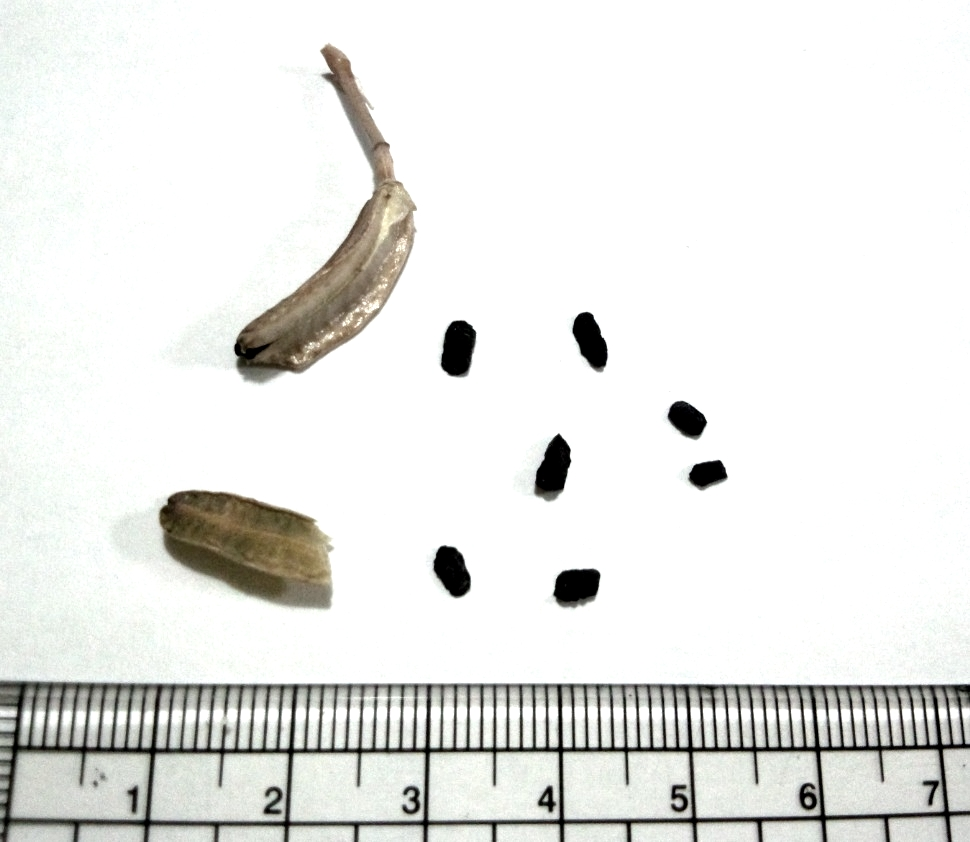 Gasteria armstrongii seeds